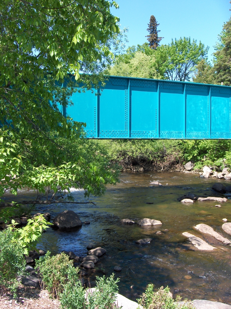 Pont et rivière Saint-Charles à Loretteville (QC, Canada)